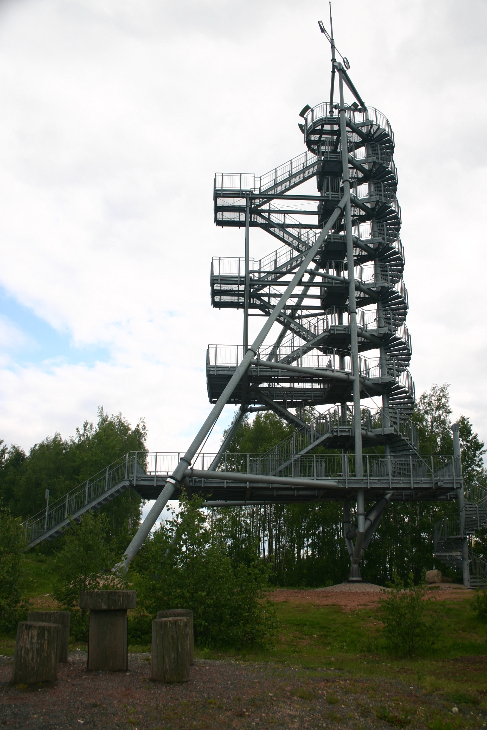 Aussichtsturm auf der Abraumhalde des ehemaligen Deutschlandschachtes in Oelsnitz (Erzgebirge) im Landkreis Stollberg in Sachsen. Lage: 12°41'20" E, 50°43', 39" N